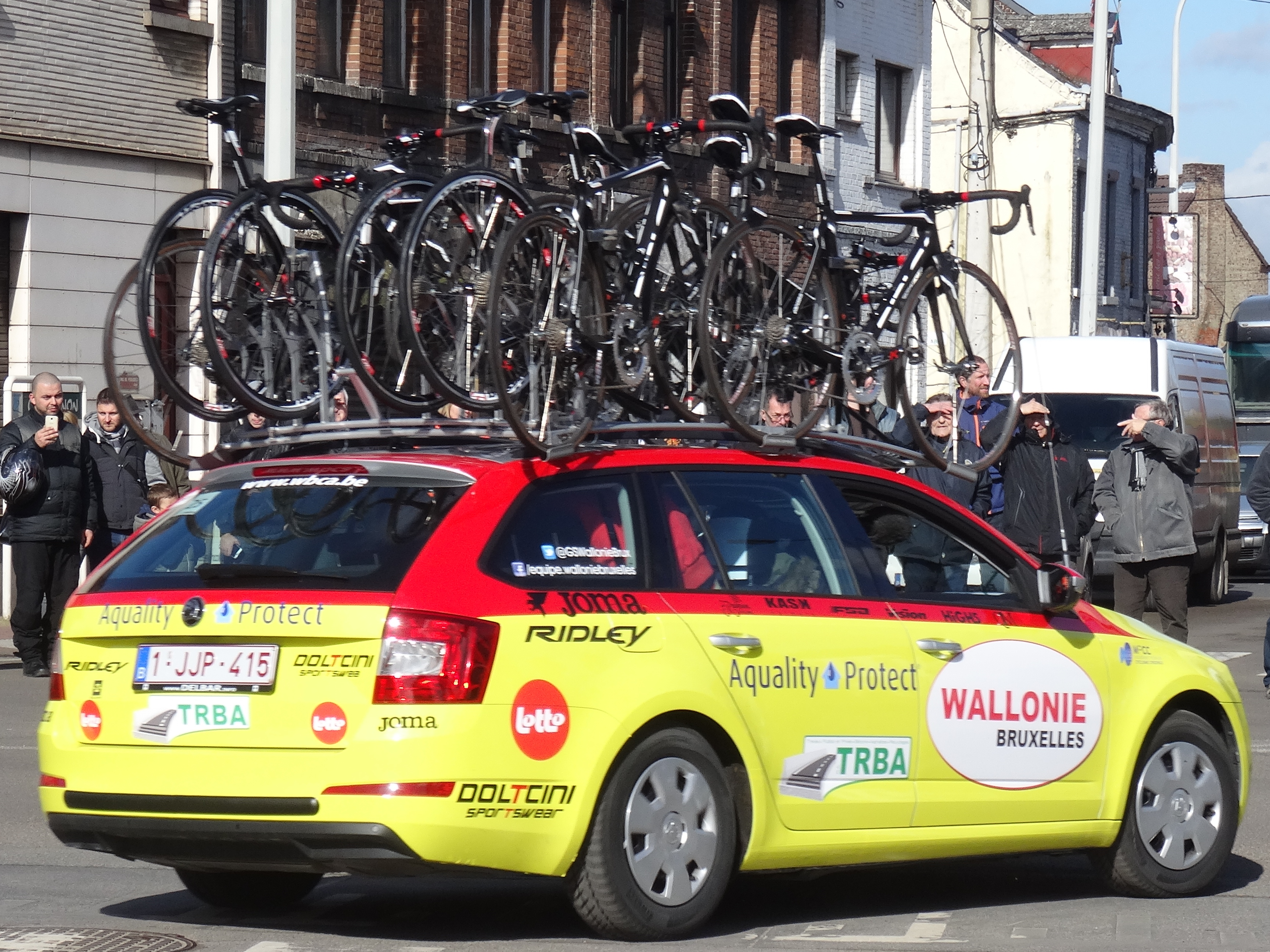 Reportage réalisé le mercredi 4 mars à l'occasion du départ du Samyn des Dames 2015 et du Samyn 2015 à Quaregnon, Belgique.